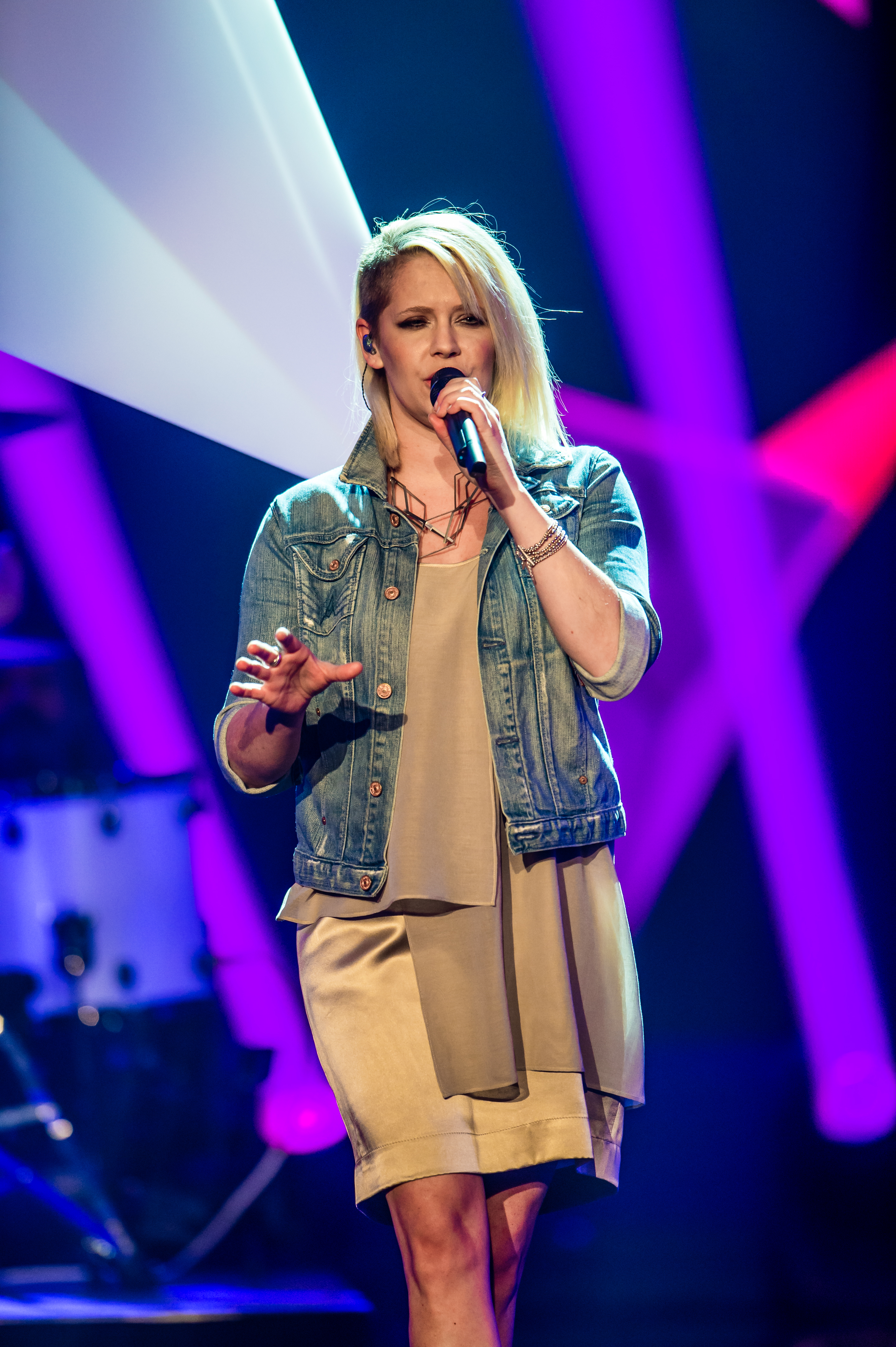 Eurovision Song Contest 2016 - Unser Lied für Stockholm - Luxuslärm